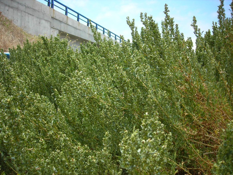 especie muy escasa que habita la IV y V región, diezmada por el consumo de cabras y ovejas, se pueden ver algunas matas en el puente del estero Púpío. Los Vilos